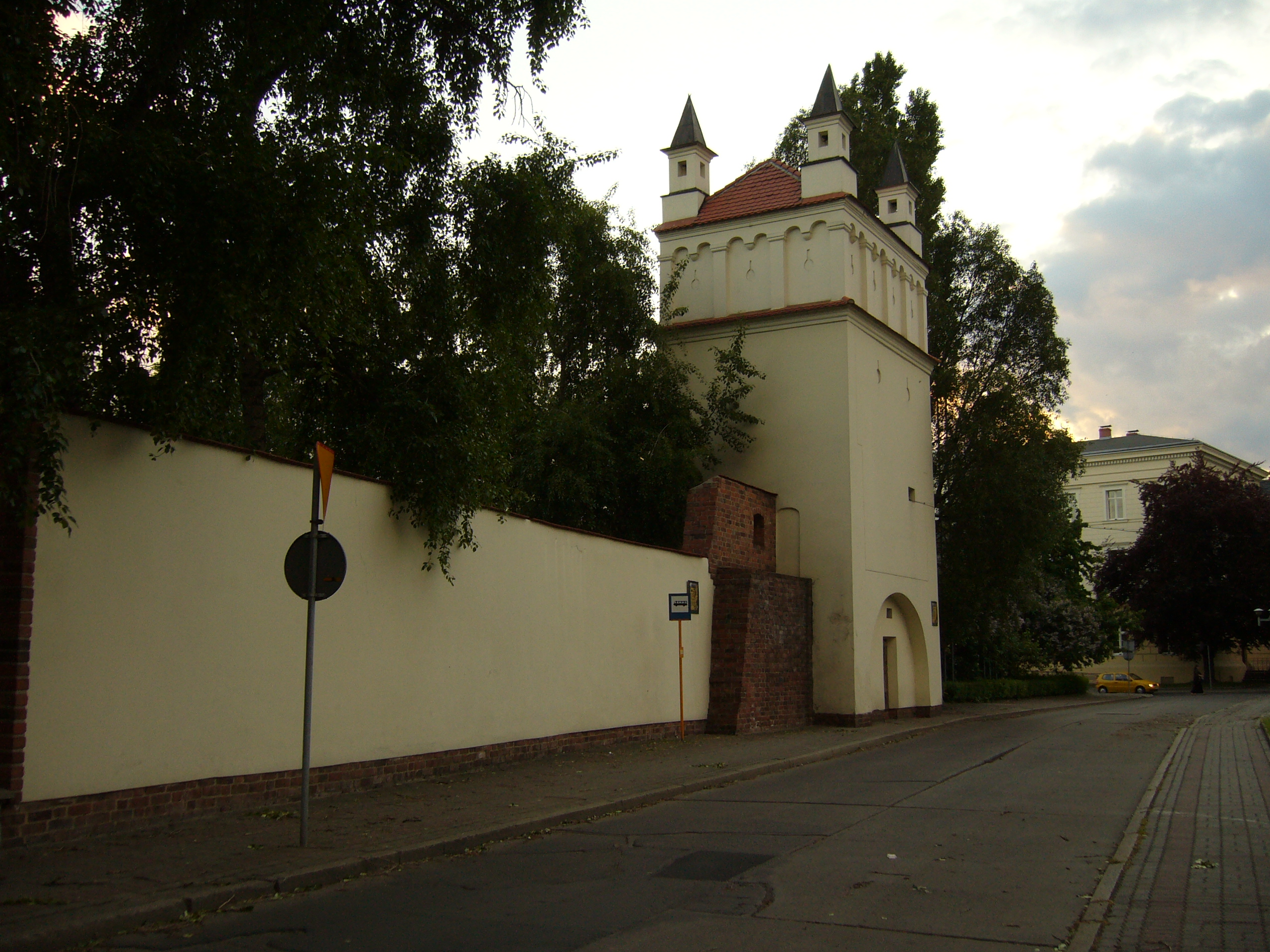 Fragment muru z fortyfikacji miejskich Raciborza z basztą